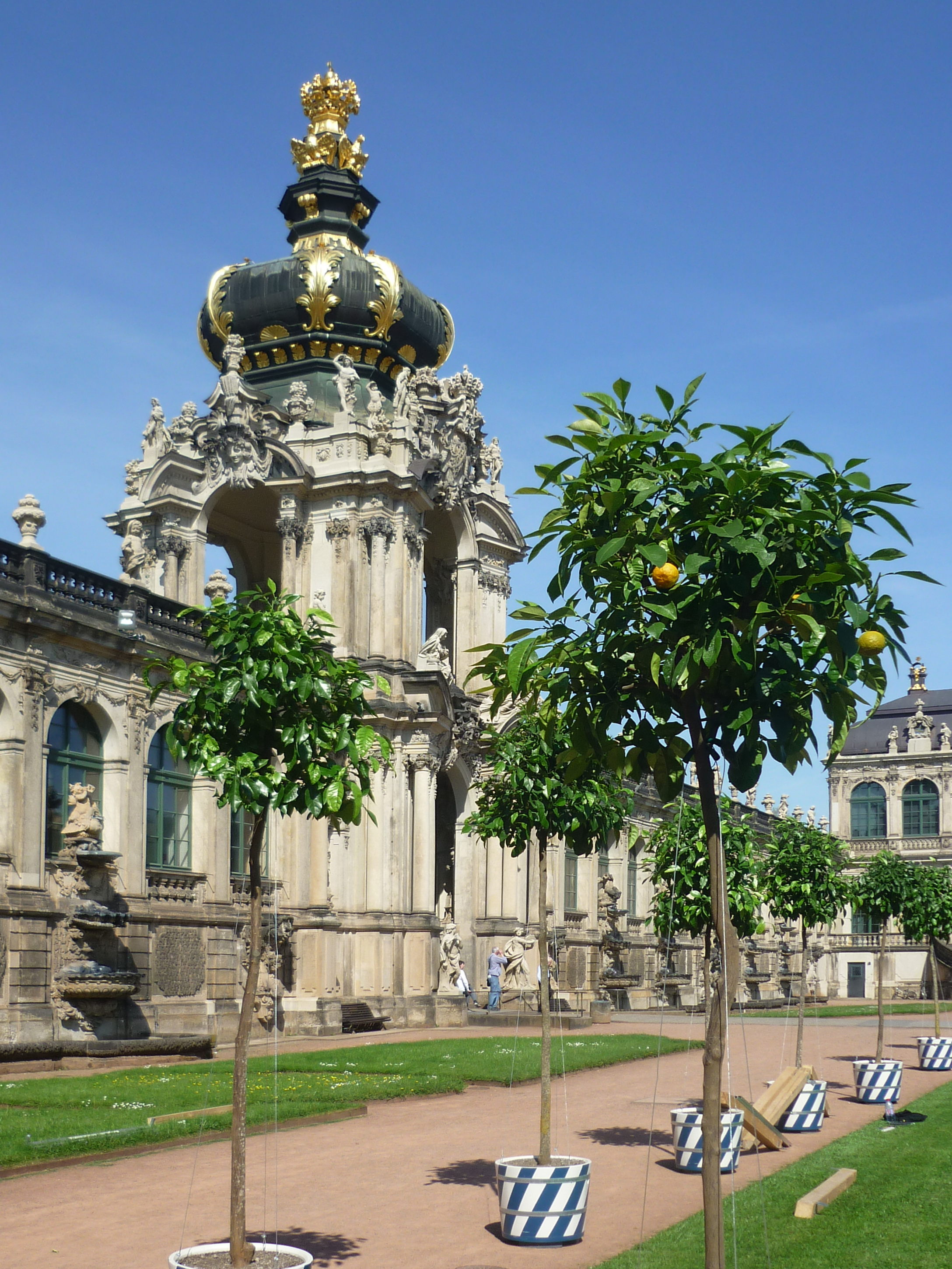 Die Rückkehr der Orangenbäume in den Dresdner Zwinger vom 19. Mai bis September 2017